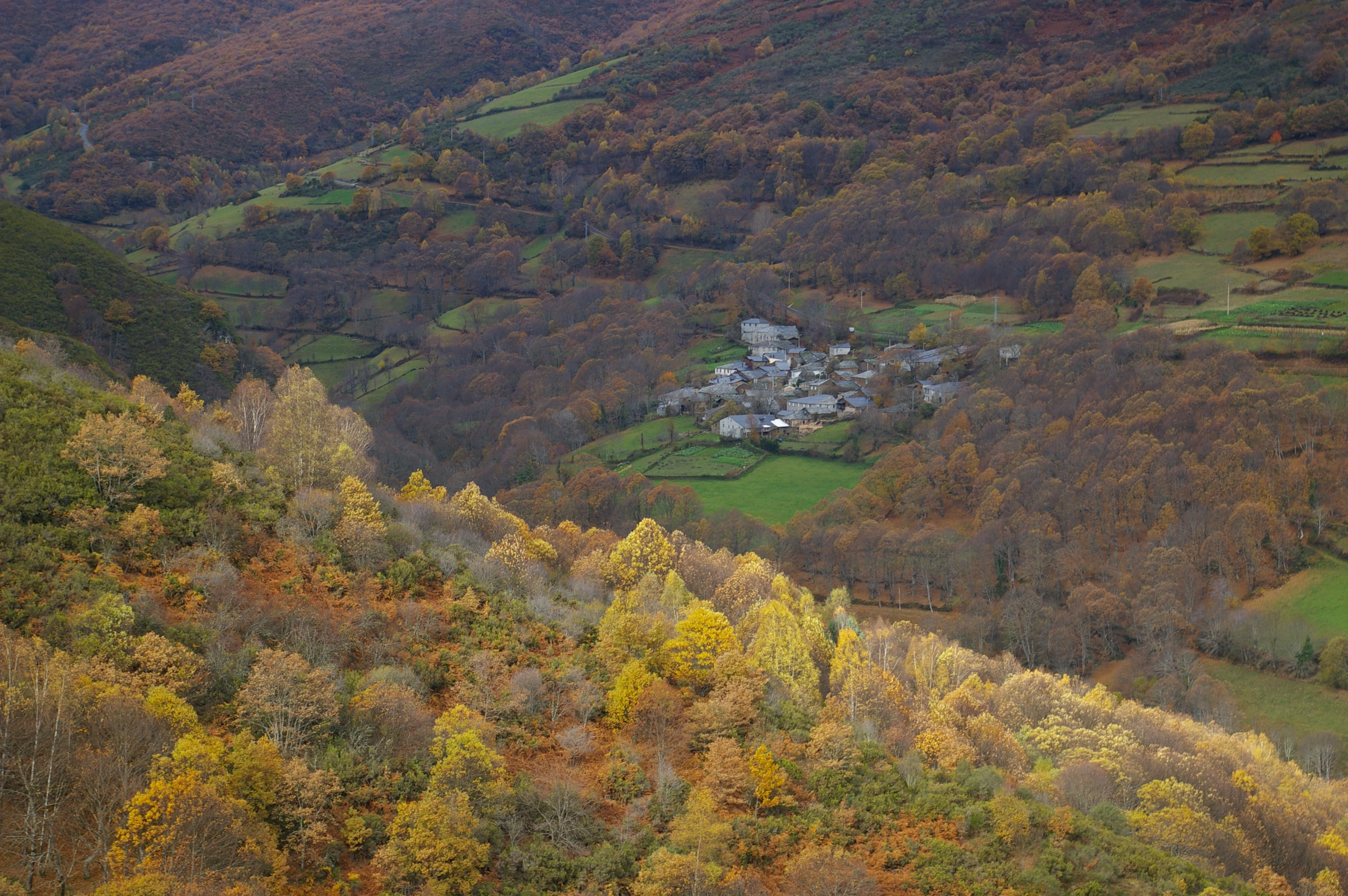 Outono no Courel. Paderne